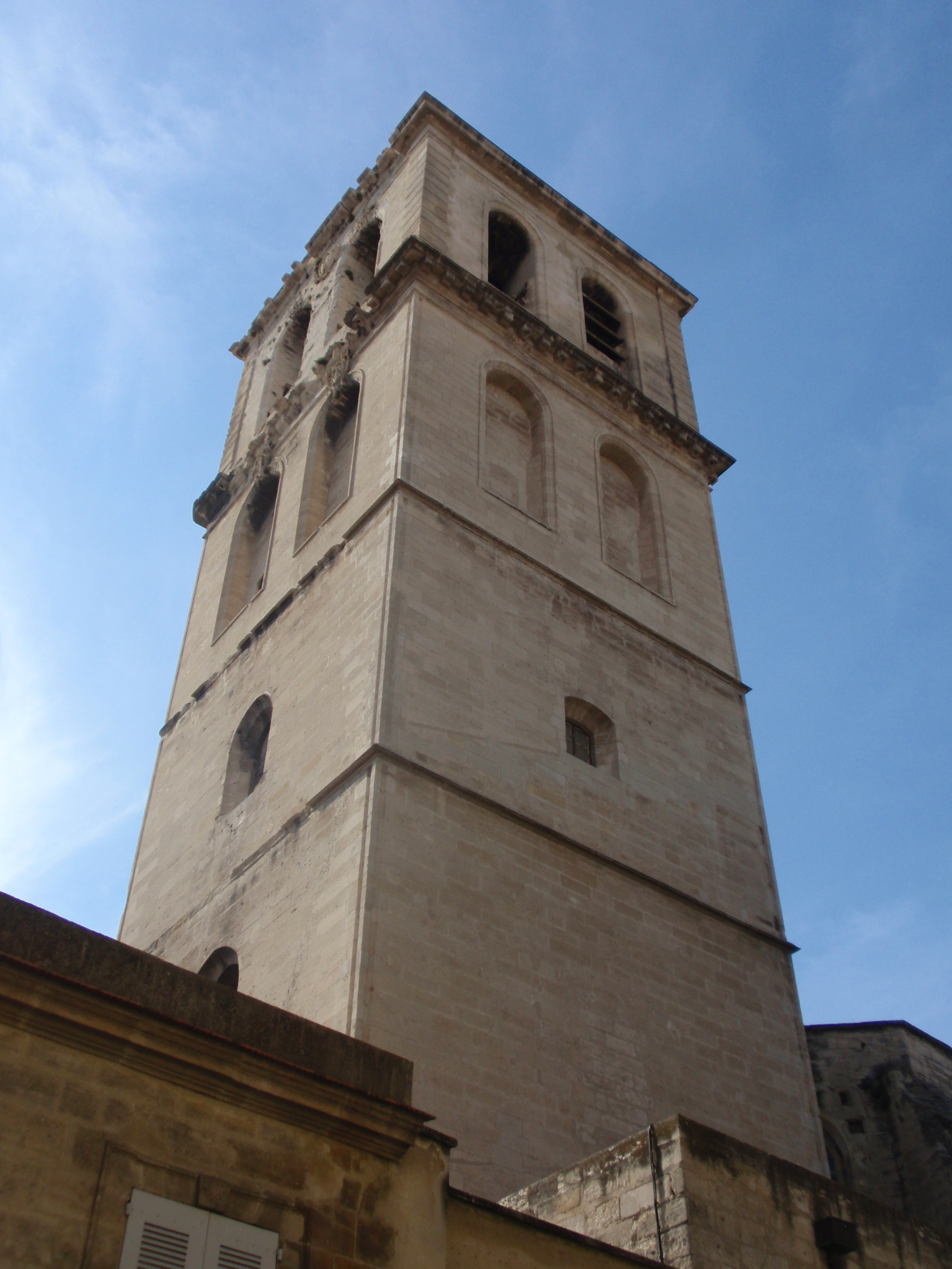 Eglise Saint-Agricol, Avignon, Vaucluse, France.